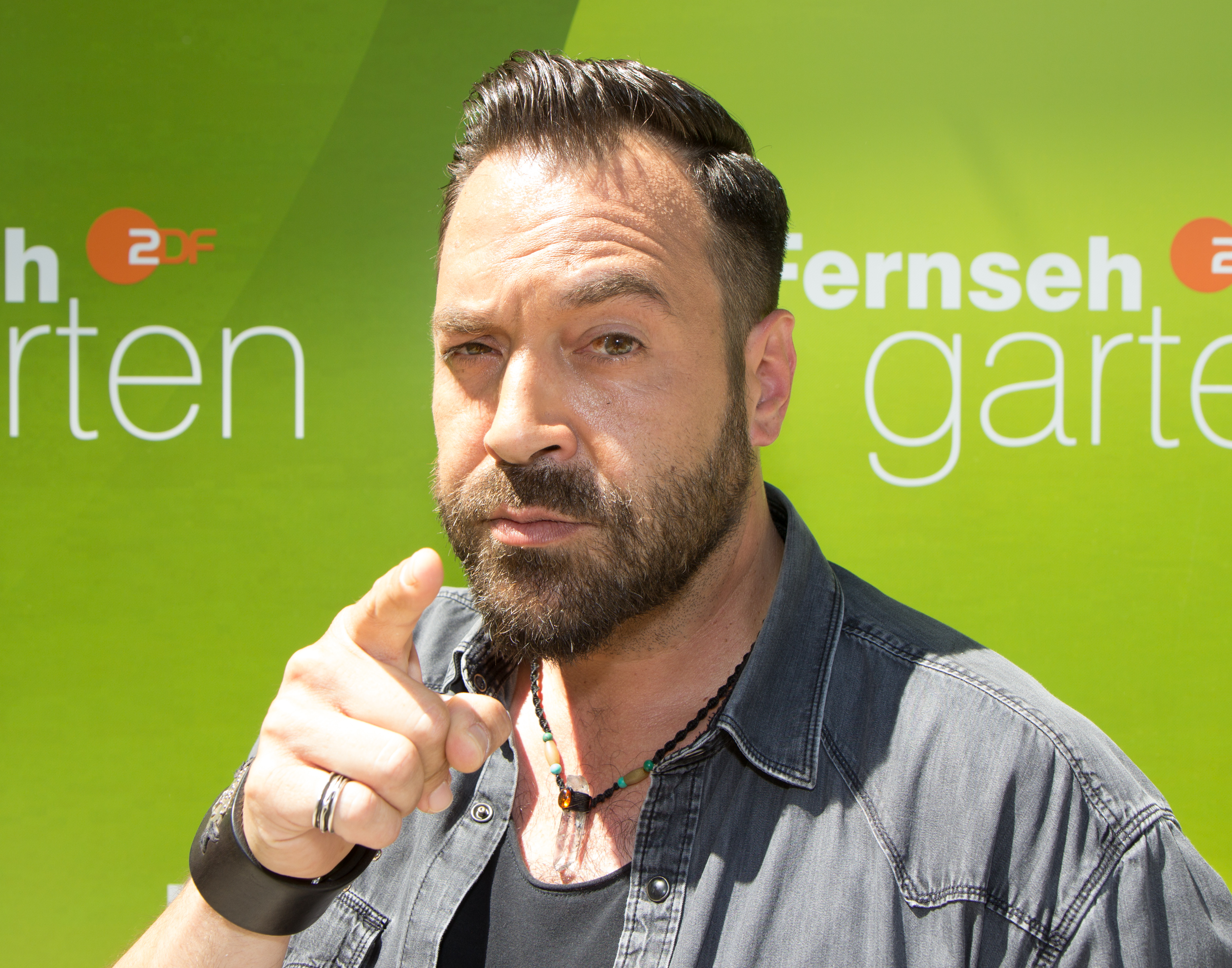 Laith al-Deen als Gast beim ZDF-Fernsehgarten am 3. Juni 2018 in Mainz.